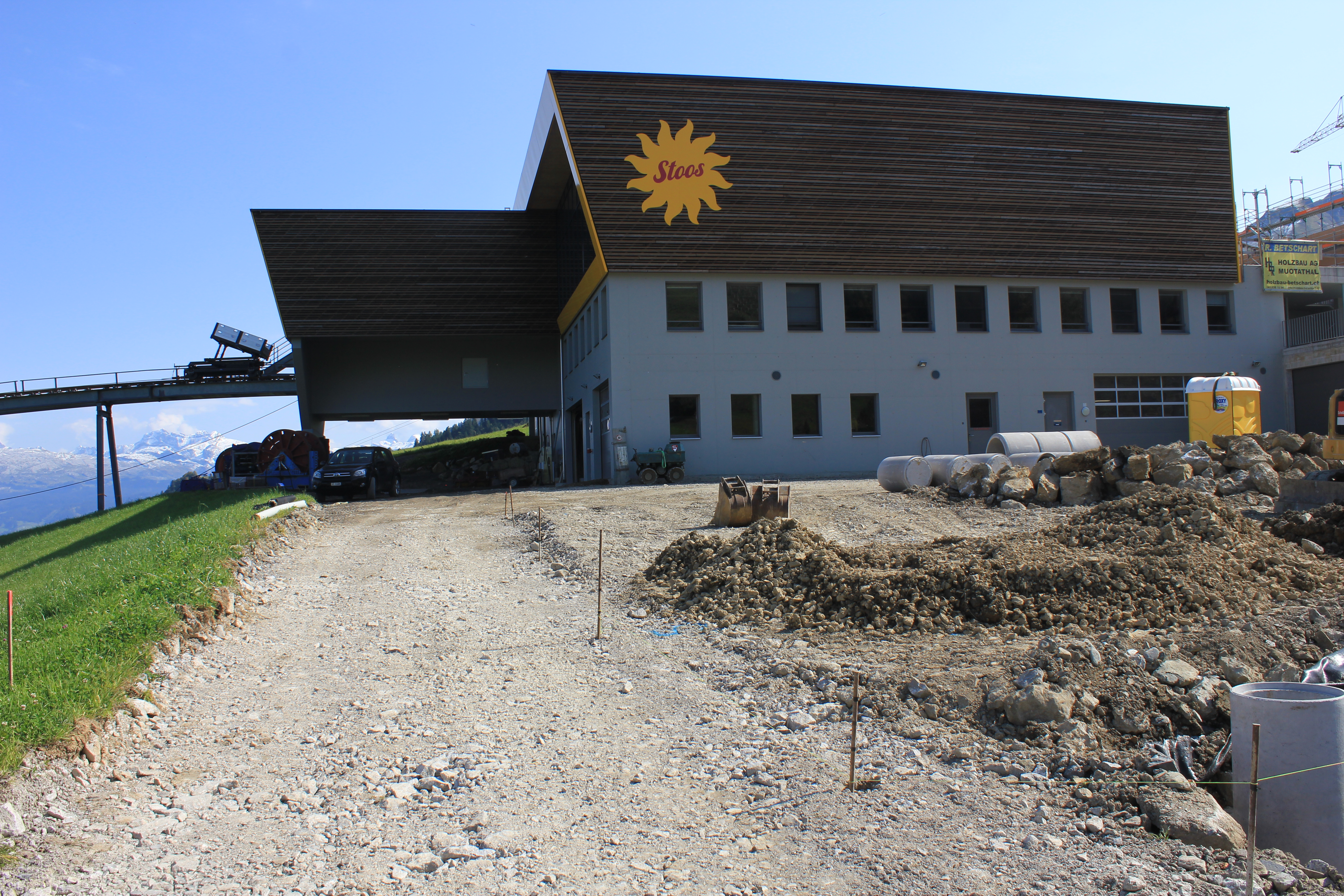 Neue Bergstation auf dem Stoos im September 2017